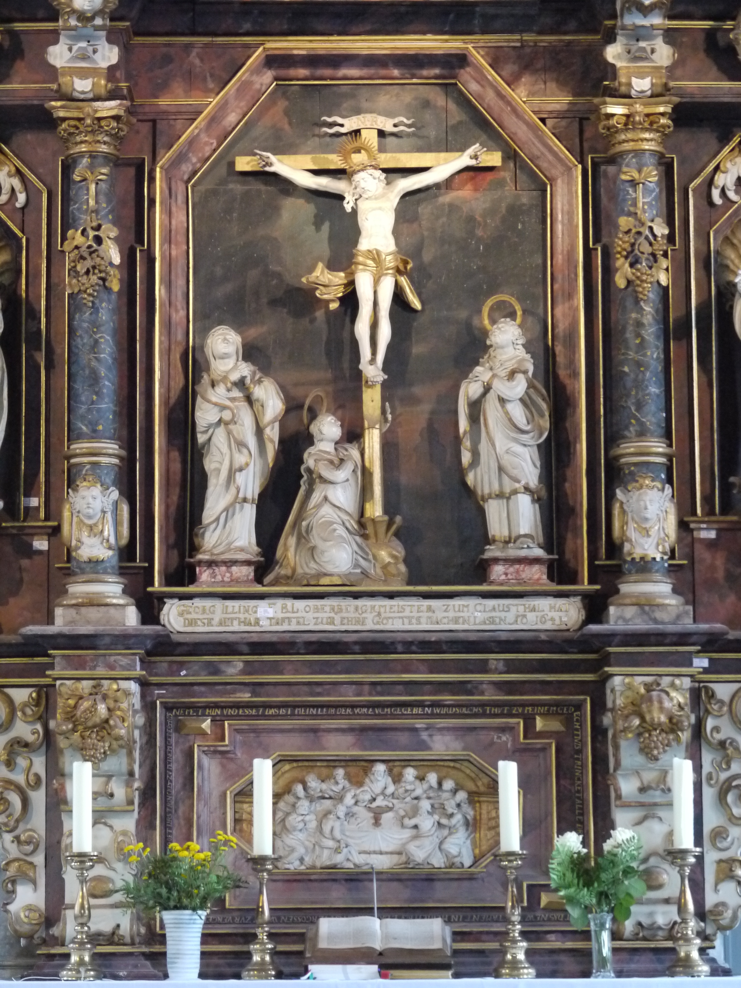 Marktkirche zum Heiligen Geist in Clausthal-Zellerfeld - Altar mit Kreuzigungsszene